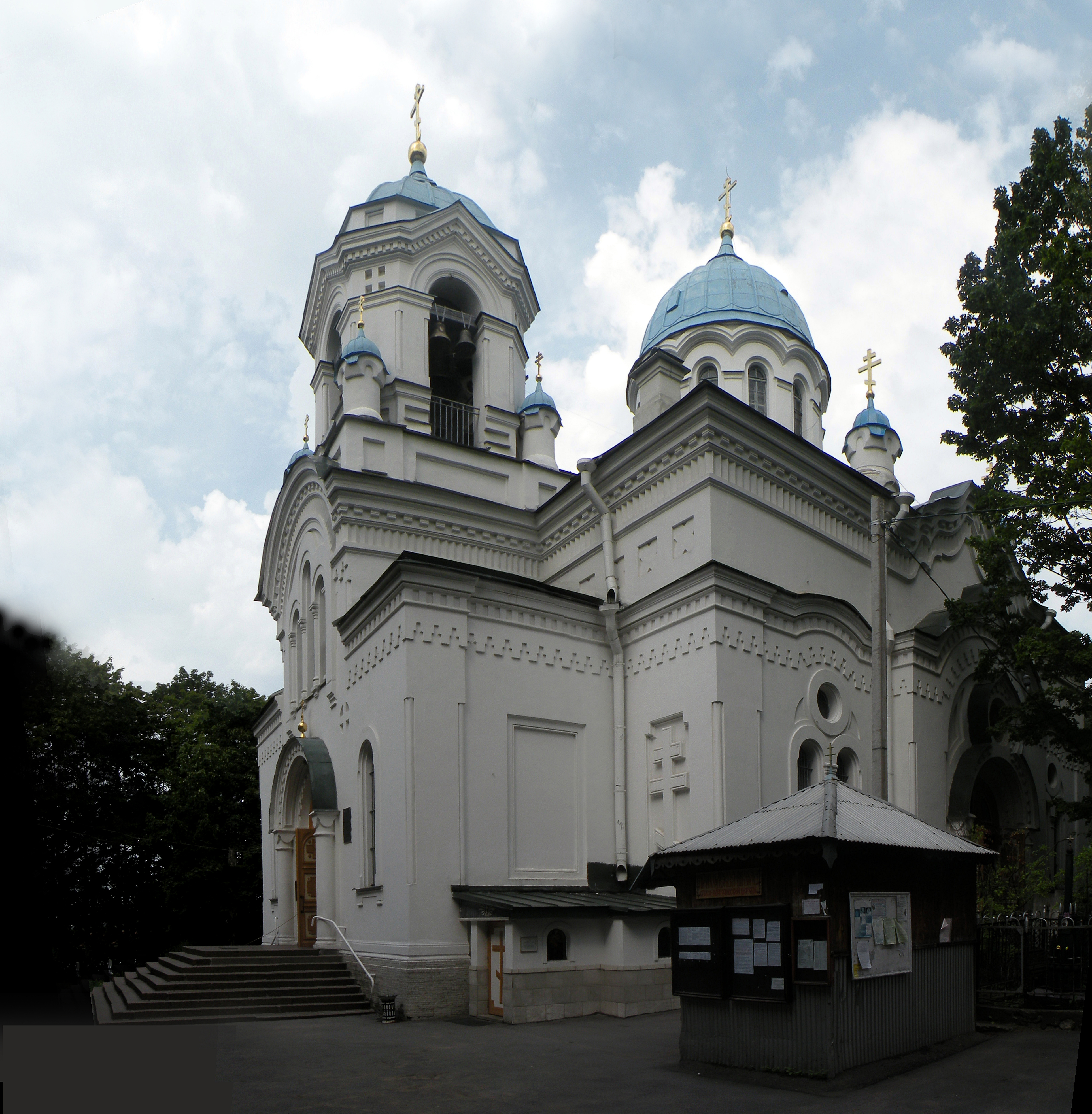 Церковь Спаса Нерукотворного Образа (Спасо-Парголовская) в Парголово (совр. Шувалово-Озерки). Построена в 1876-1880 по проекту архитектора К. А. Кузьмина.